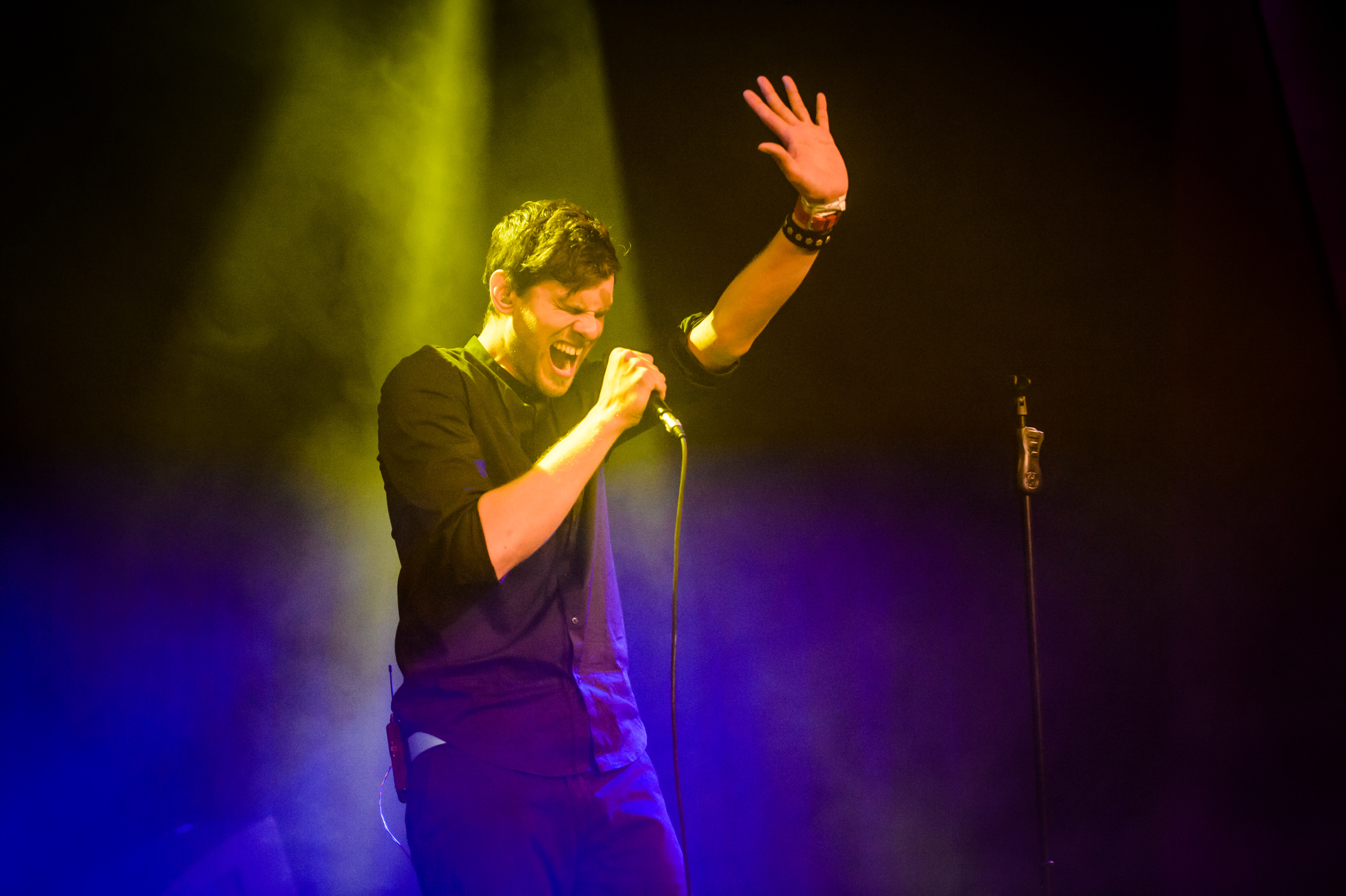 'Amphi Festival 2017; Tanzbrunnen Köln': 'Torul'